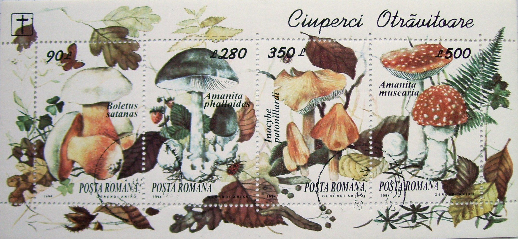 Source: Post of Romania